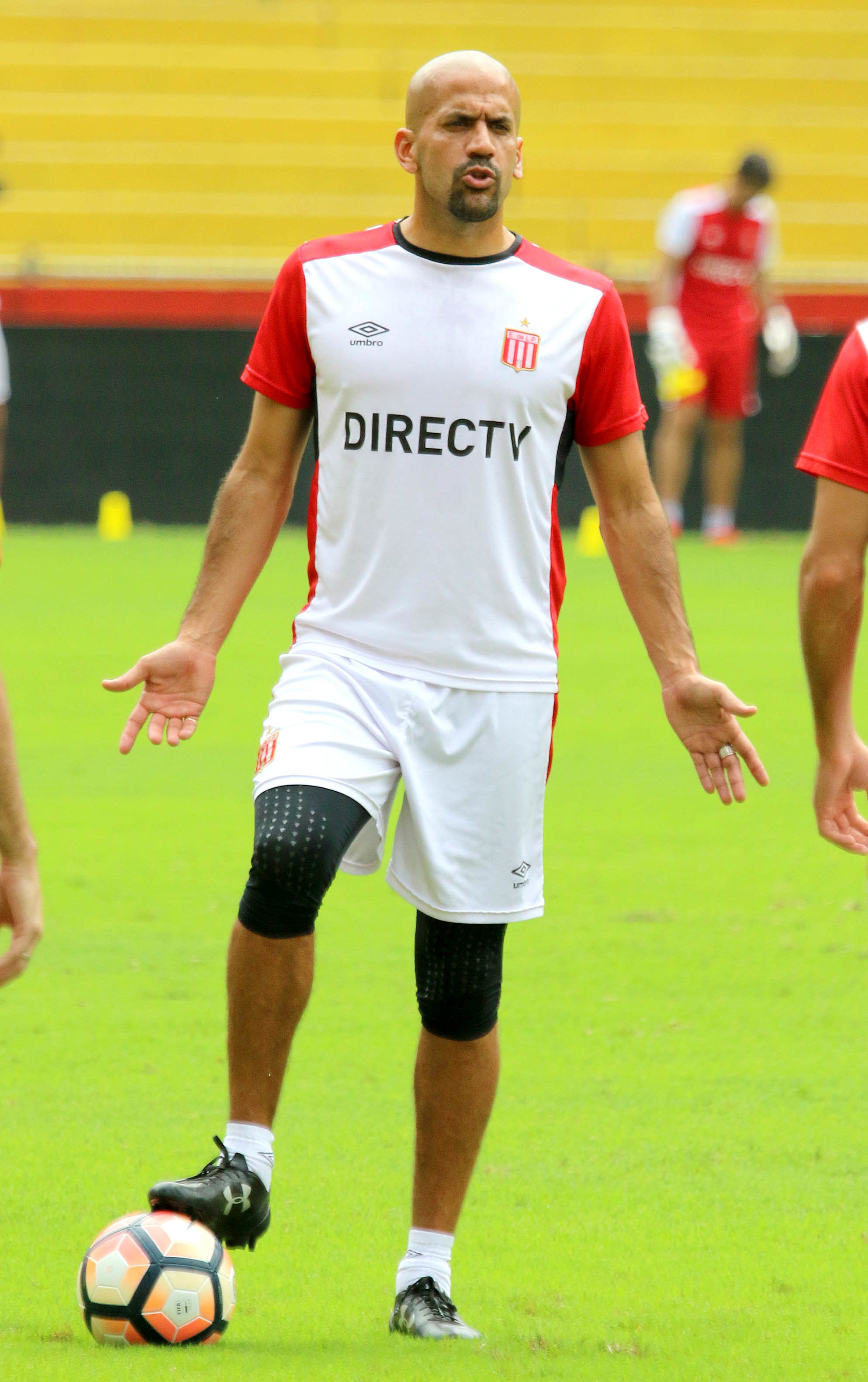 Guayaquil, miércoles 17 de mayo del 2017 (Andes).-El equipo argentino Estudiantes de la Plata entrenó esta mañana en la cancha del estadio Monumental de Guayaquil, el equipo "Pincharrata" se enfrenta este jueves a Barcelona de Ecuador, por la Copa Libertadores. En la gráfica Juan Sebastian Verón, Presidente y jugador del club. Foto:Andes/César Muñoz